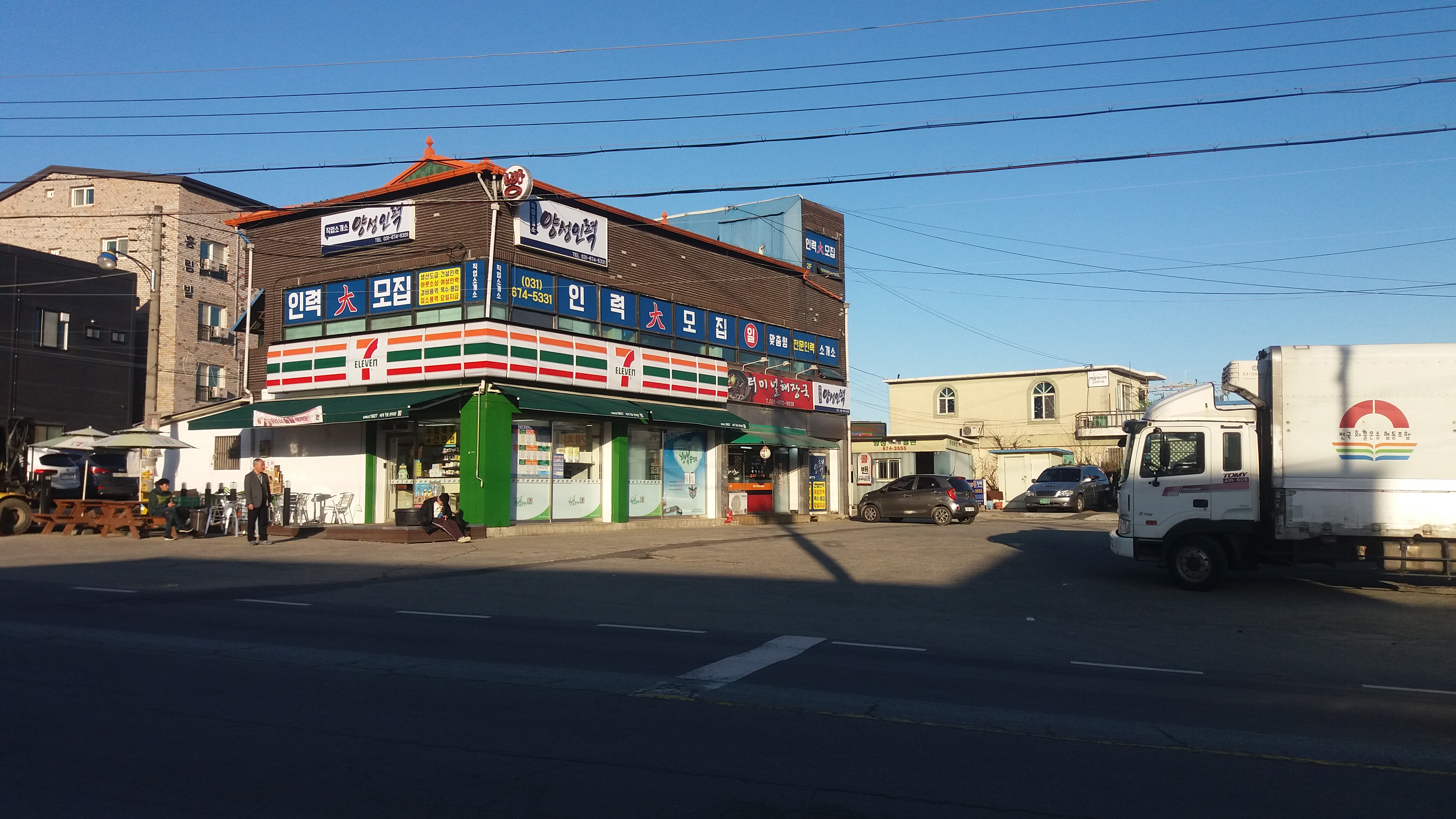 양성터미널